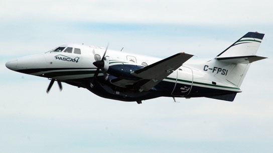 Pascan BAe Jetstream 3212 en vol